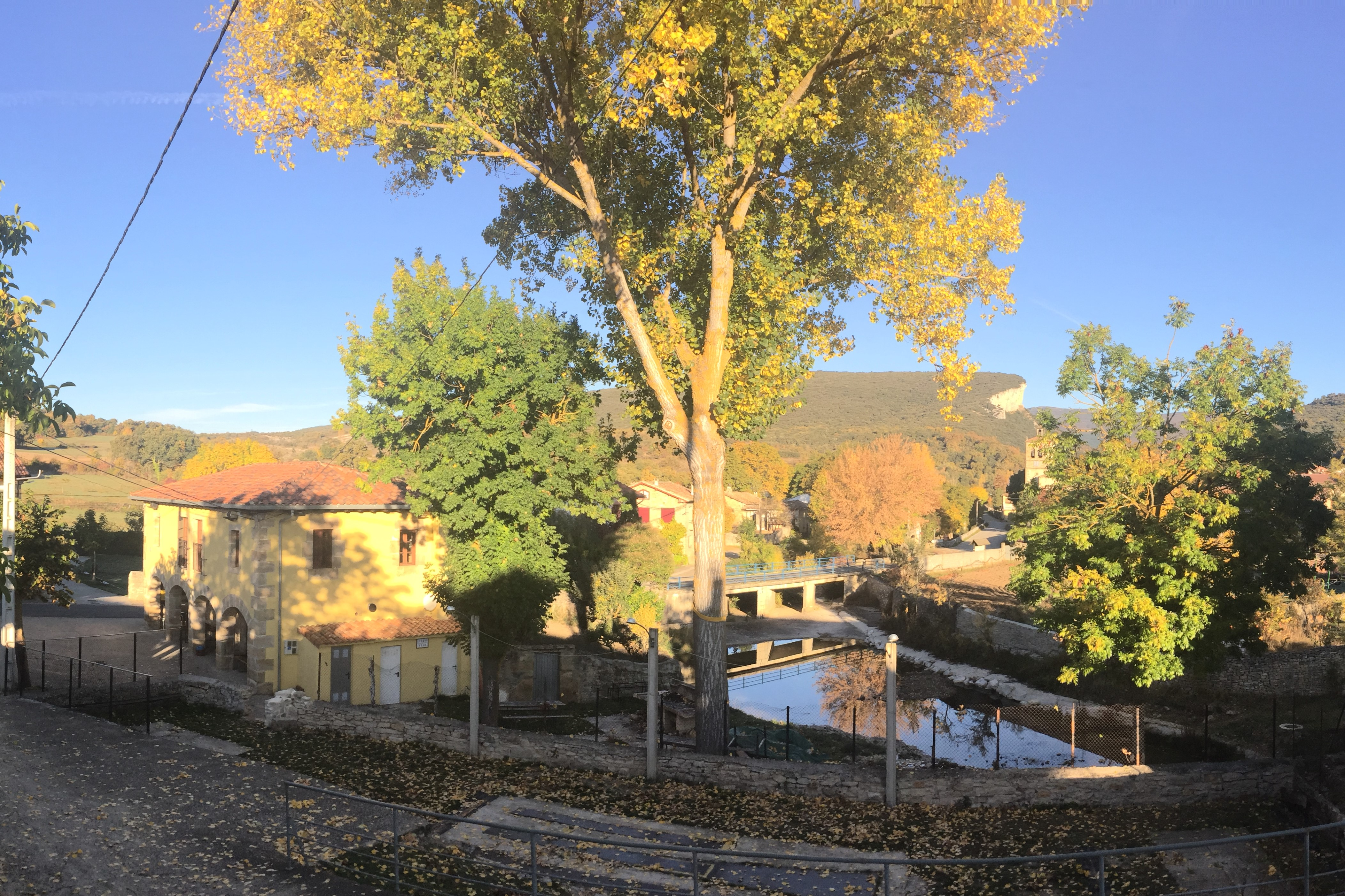 Escuela porticada, Bolera tres tablones, charca en el lecho de rio Trema, Iglesia de San Juan y Montes de la Rad y la Isa con el Somo al fondo